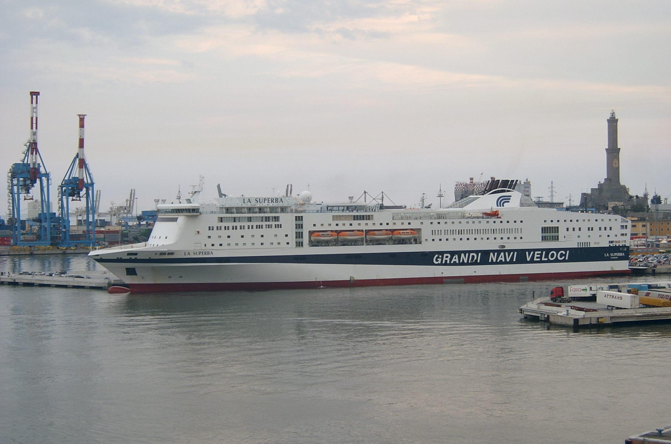 traghetto La Superba ormeggiato a Genova